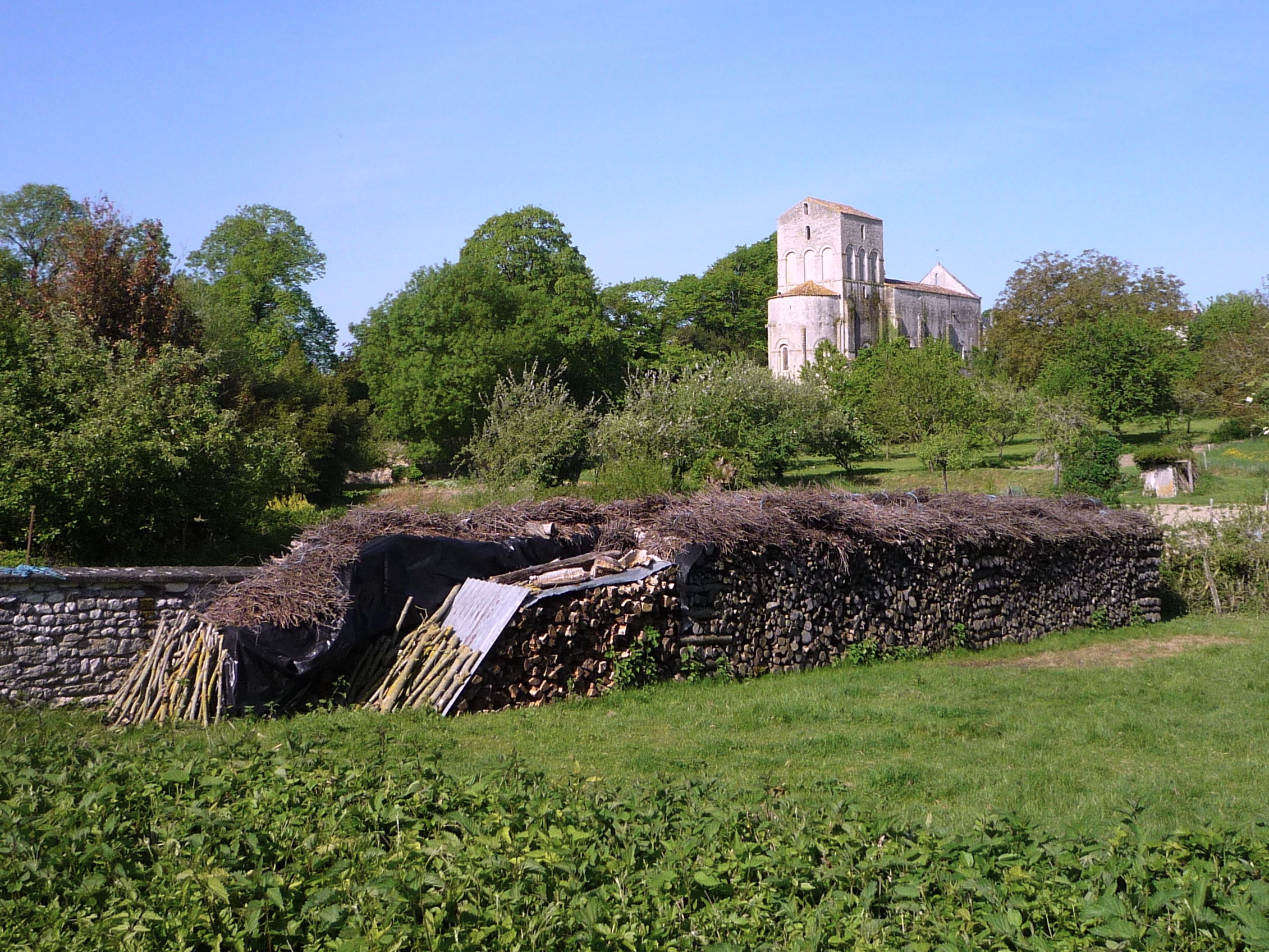 Eglise Saint Pierre située à Lozay en Charente Maritime, vue par l'est. C'est une église romane du 12eme siècle classée Monument Historique depuis 1953.